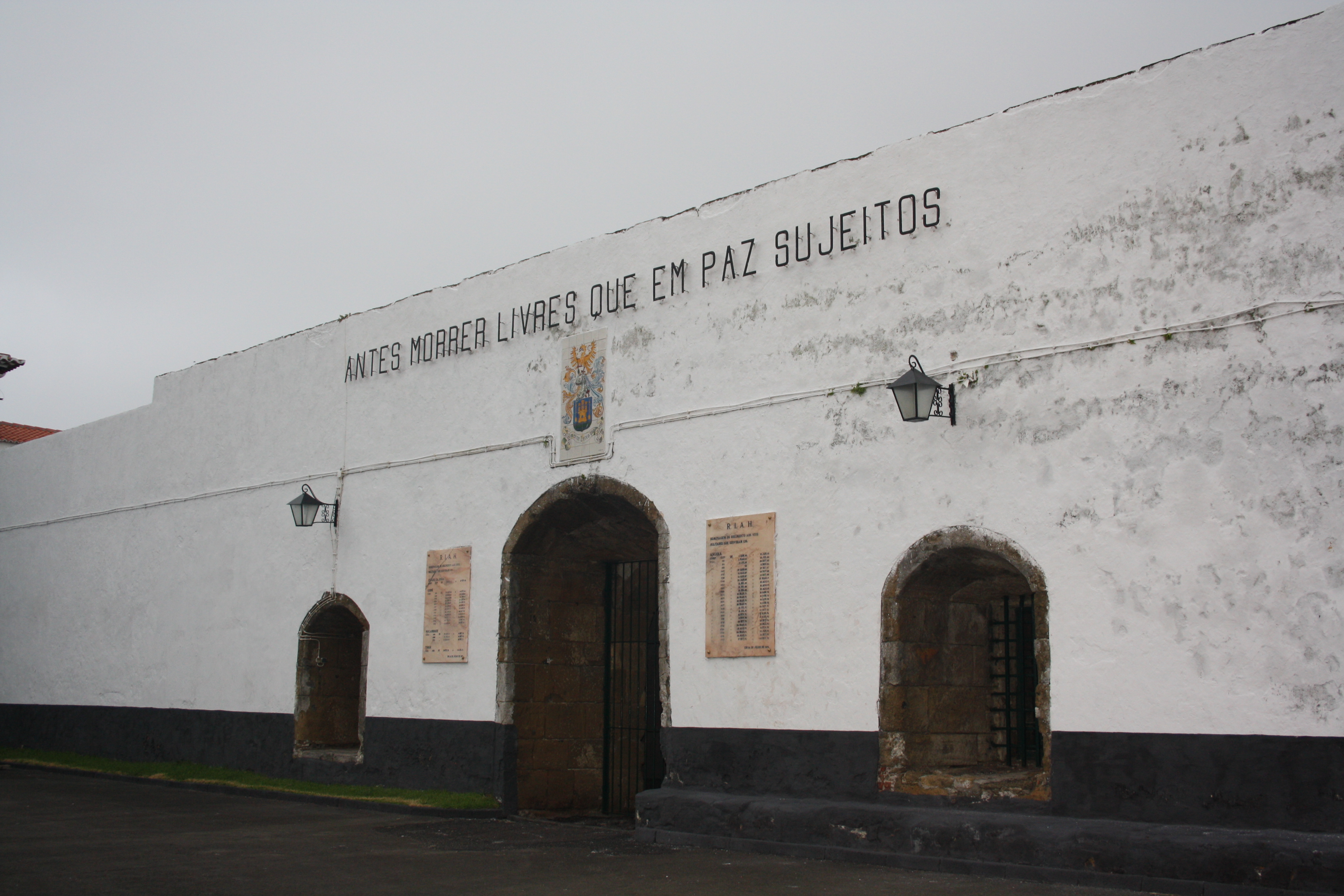 Divisa do RG1 por cima do brasão em azulejos